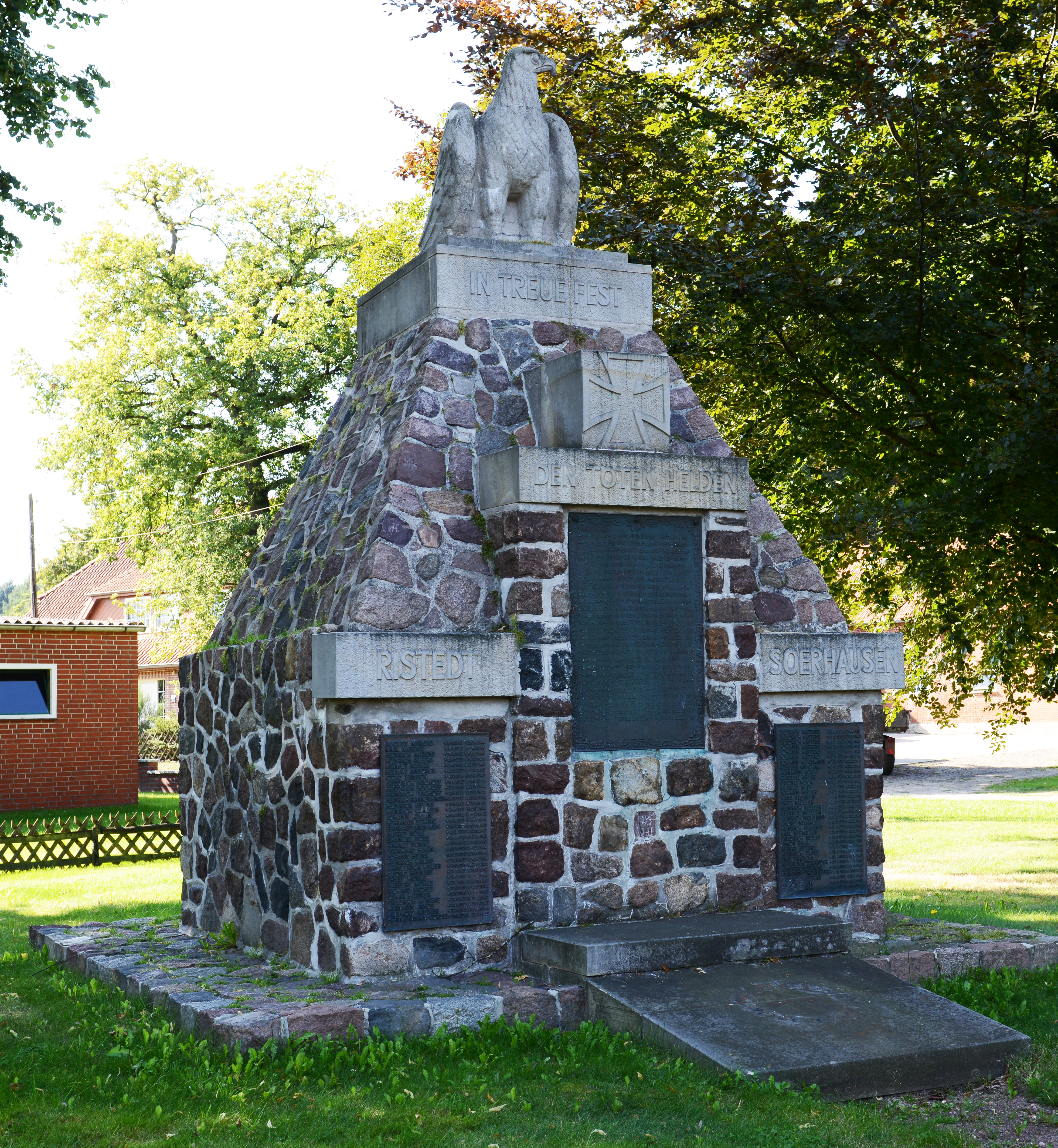 Baudenkmal in Syke Ristedt